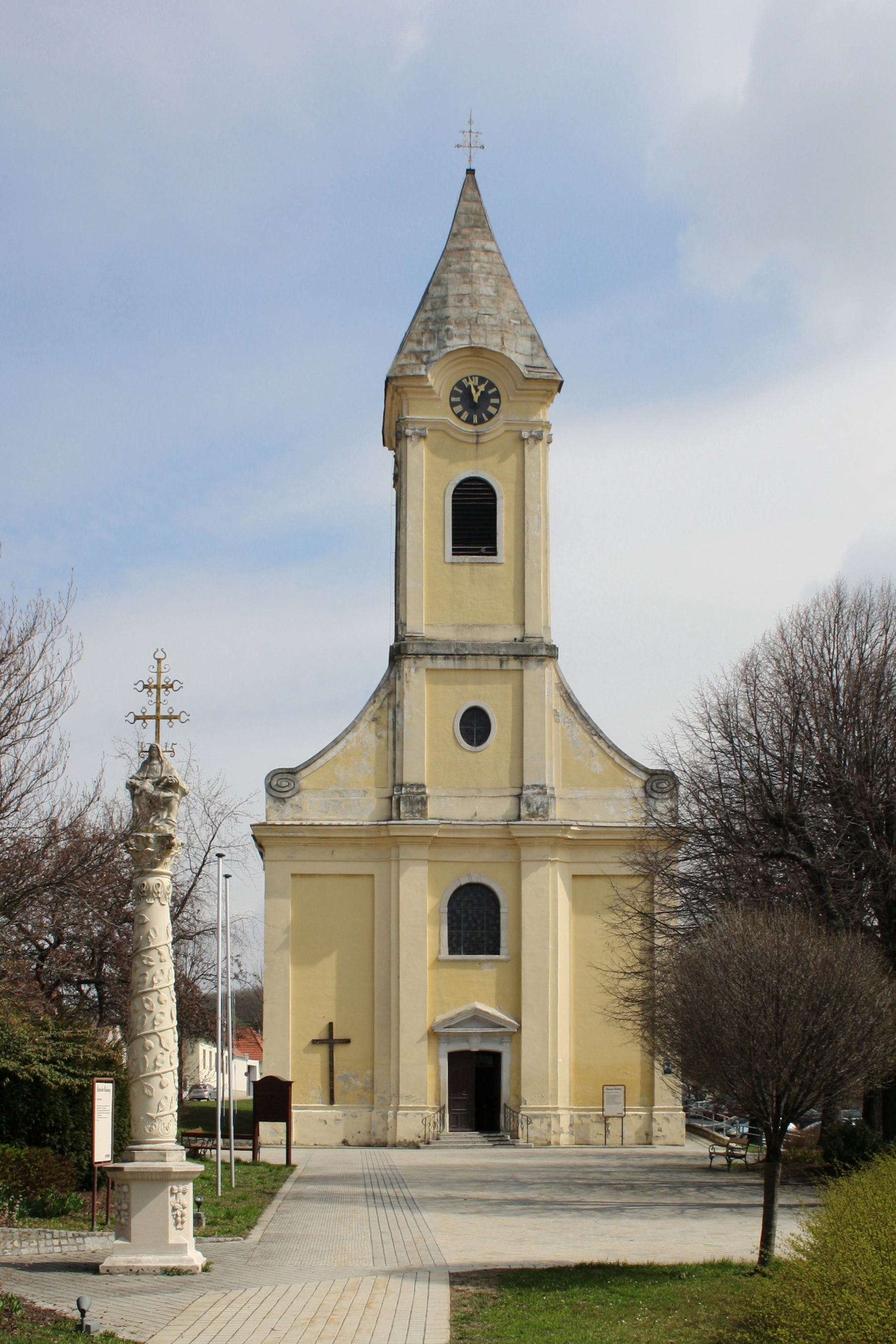 Die röm.-kath. Pfarrkirche hl. Anna in der burgenländischen Marktgemeinde Hornstein.